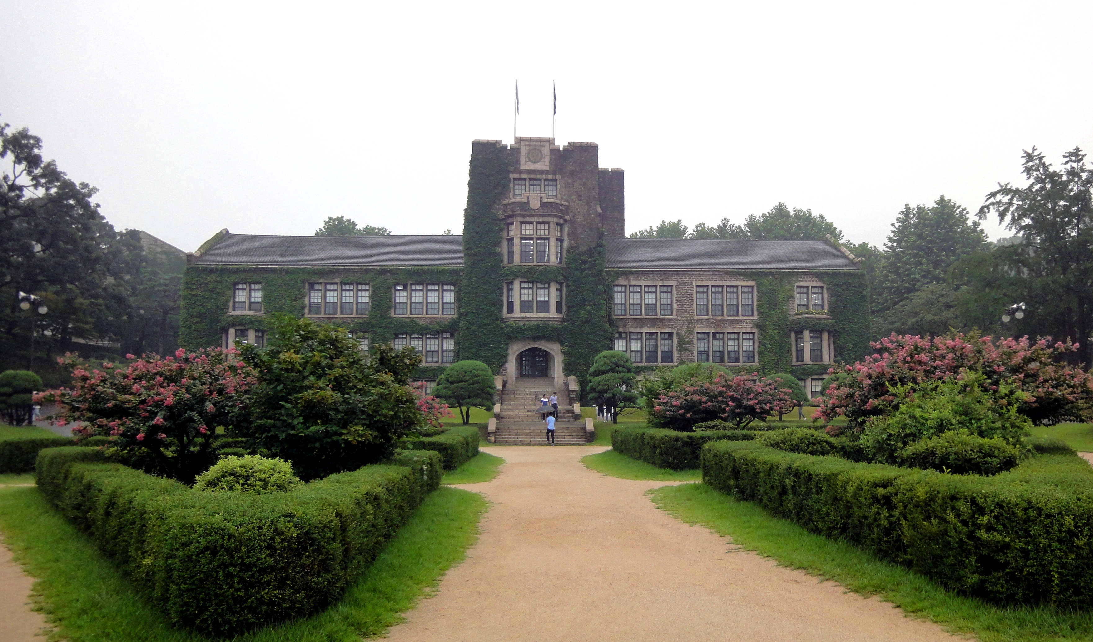 연세대학교 전경